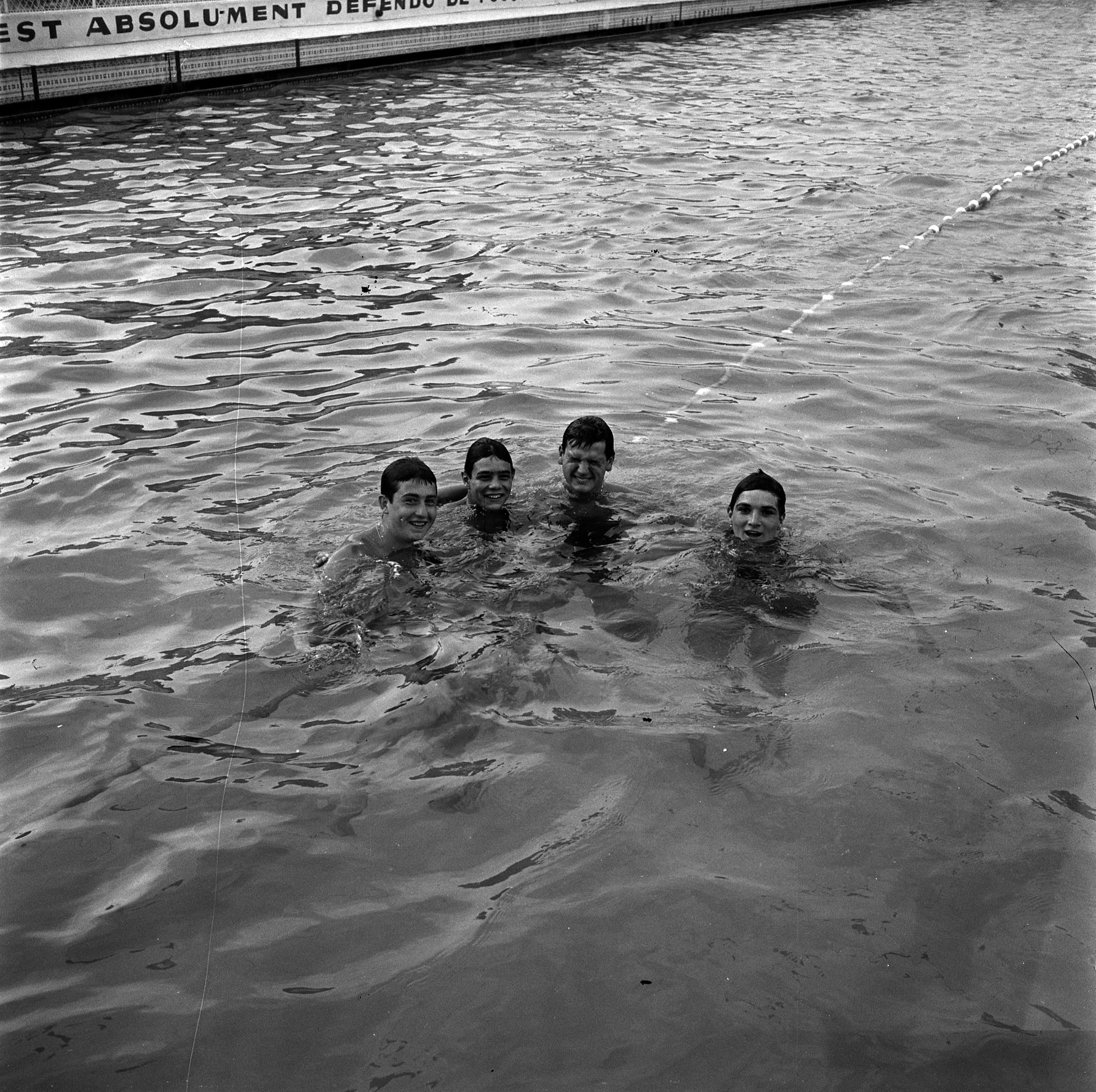 Piscine Castex (Parc Municipal des Sports, île du Ramier). 27 juillet 1964. Le nageur Alain Mosconi (au centre, les yeux fermés) entouré de trois autres nageurs du club de natation les Dauphins du TOEC (Toulouse Olympique Employés Club). Les quatre nageurs posent dans la piscine, vue de face, contre-plongée.